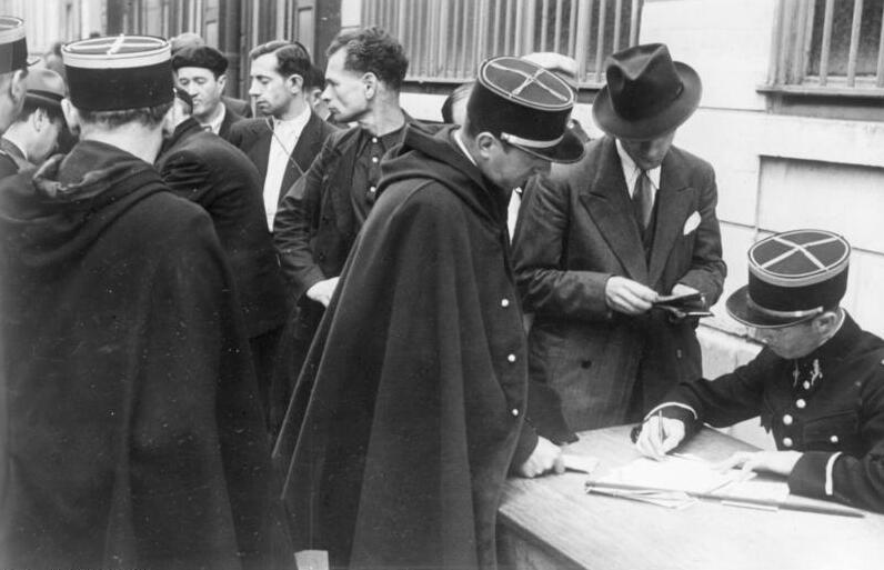 Zentralbild II. Weltkrieg 1939 - 1945 In dem von der faschistischen deutschen Wehrmacht besetzten Frankreich, im August 1941. Französische Polizei verhaftet auf Weisung der deutschen Besatzer die Juden und nimmt die Personalien auf. Dans les territoires occupés par l’armée allemande en France, en août 1941: La Police française enregistre l’identité de Juifs 8281-41